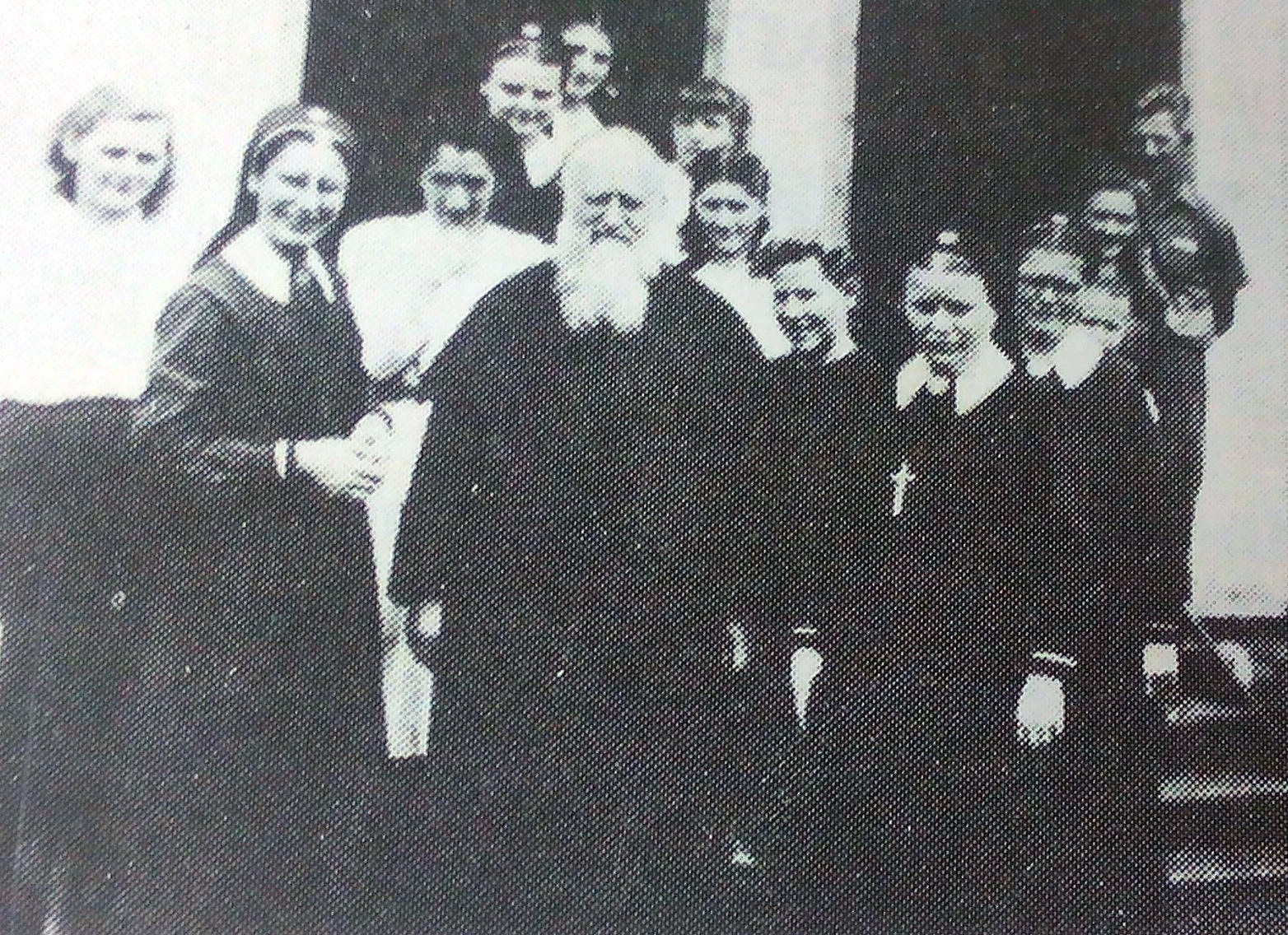 El padre José Kentenich a su paso por Oberá. A su derecha la hermana Asunción.